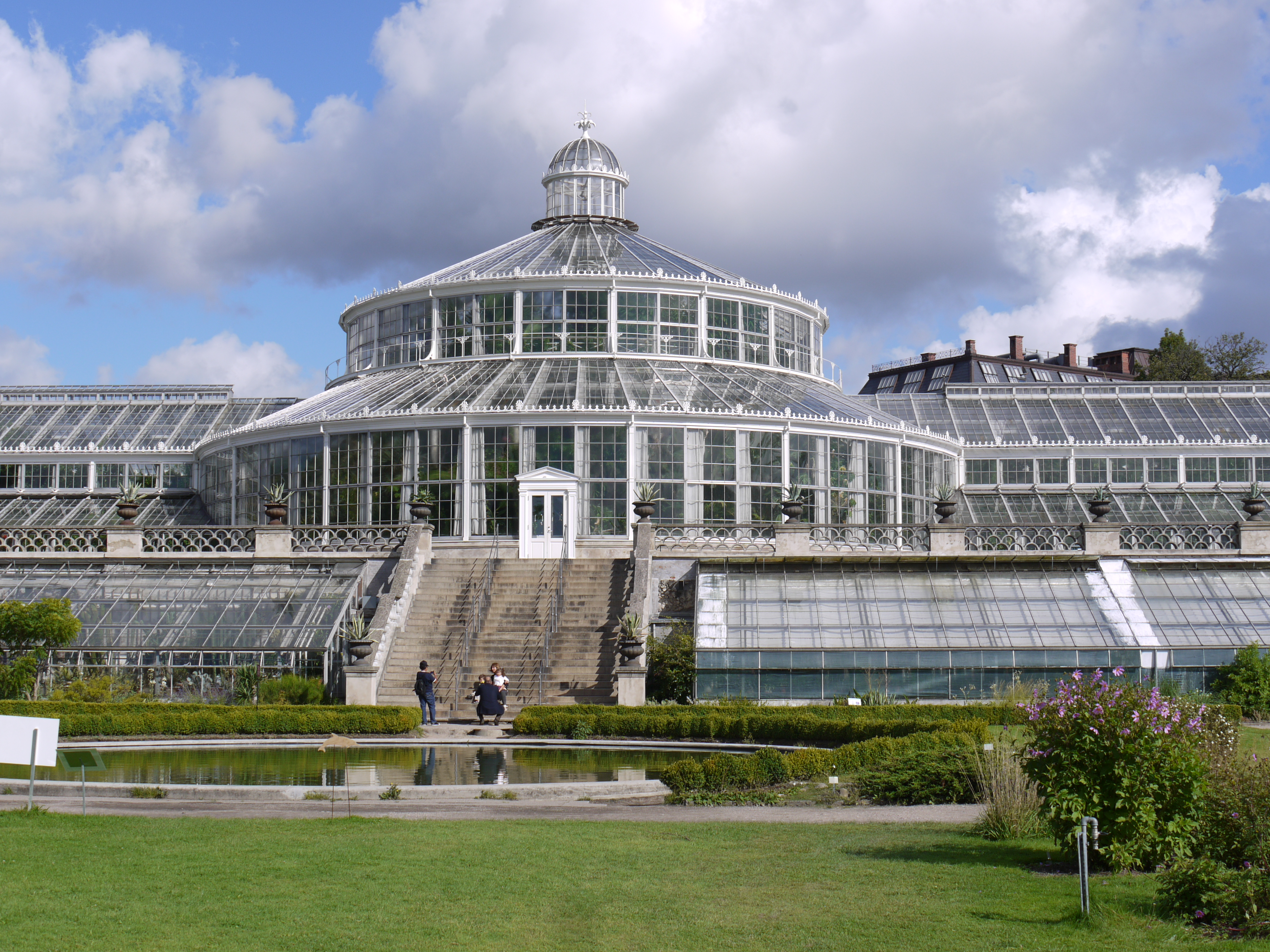 The Palm House in Copenhagen Botanical Garden in Copenhagen, Denmark